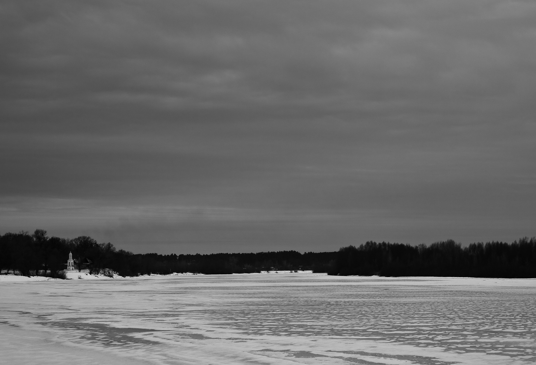 Беларуская (тарашкевіца): Палацава-паркавы ансамбль: палац, фантан, гаспадарчыя і вытворчыя пабудовы, альтанка, парк. г. Нароўля This is a photo of Belarusian heritage monument. Reference number: 312Г000536 ( WLM)